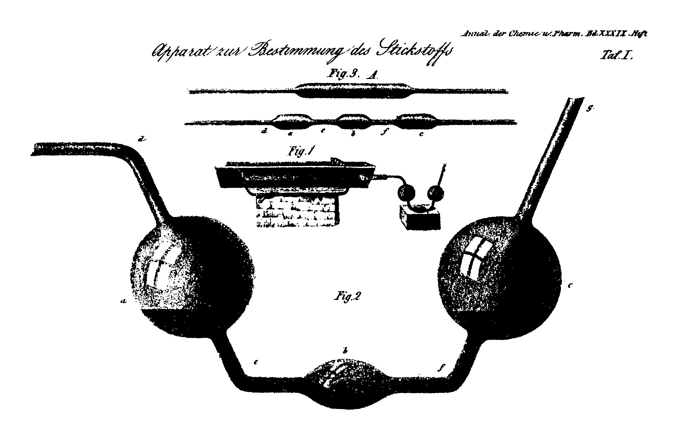 Apparat zur Bestimmung des Stickstoffs nach Heinrich Will und Franz Varrentrapp; Abbildung aus der entsprechenden Originalveröffentlichung